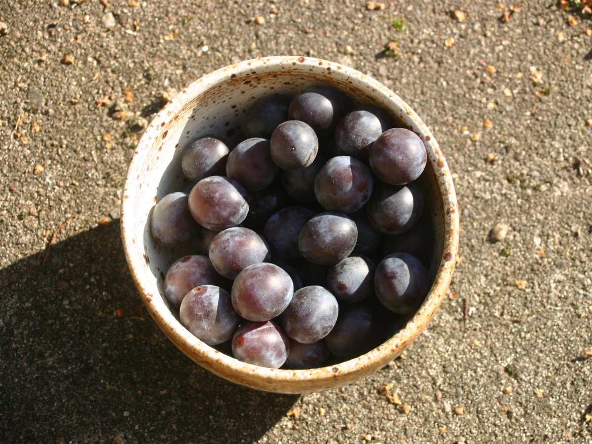 Prunus domestica ssp. insititia: Fruits